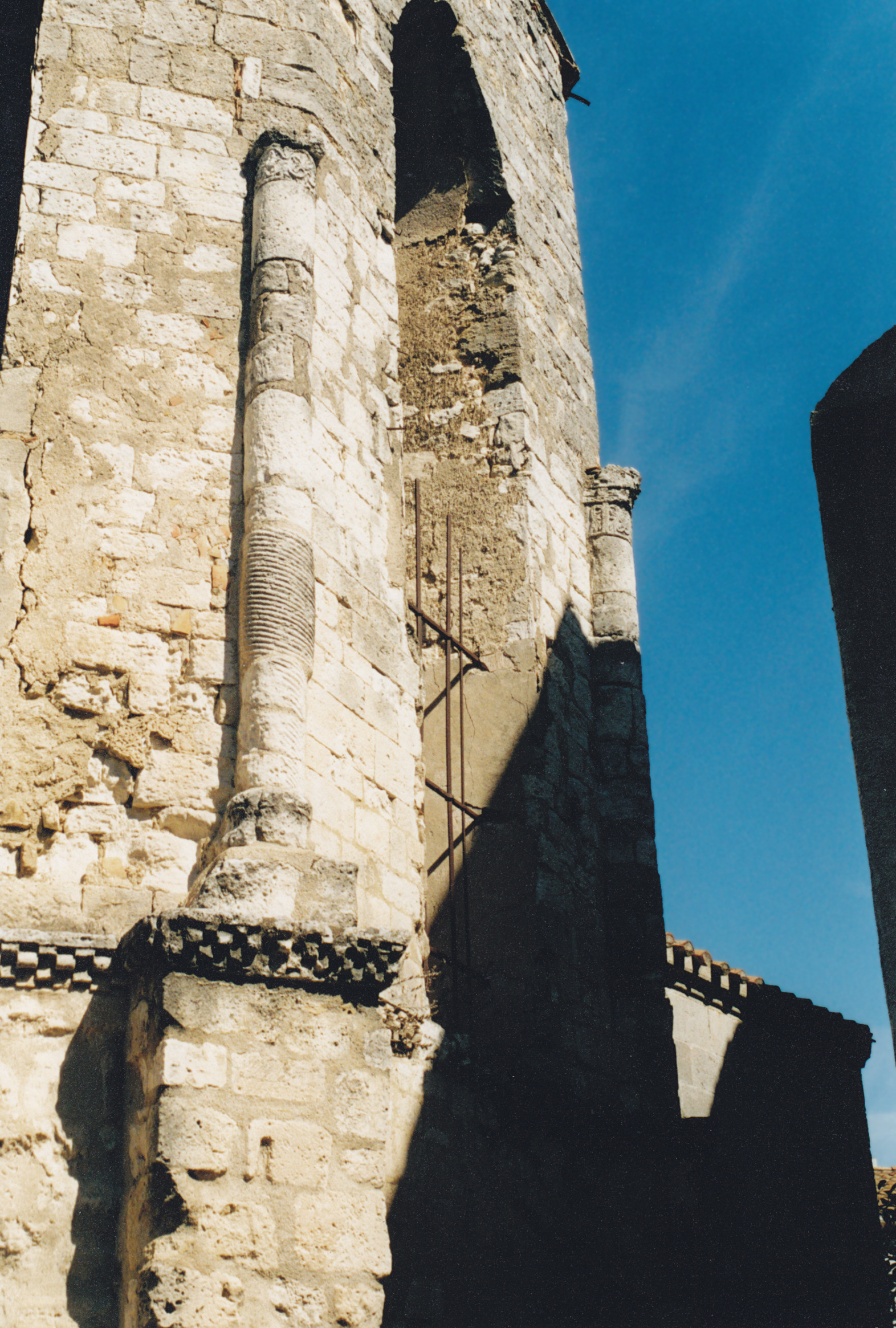 France - Languedoc - Aude - Église Saint-Martin de Fleury d'Aude